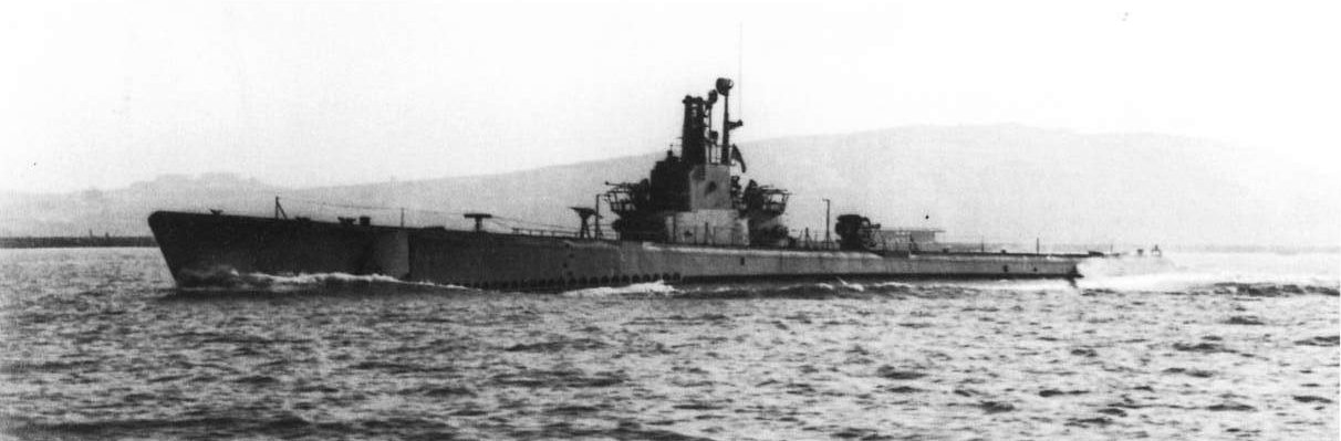 USS Mingo